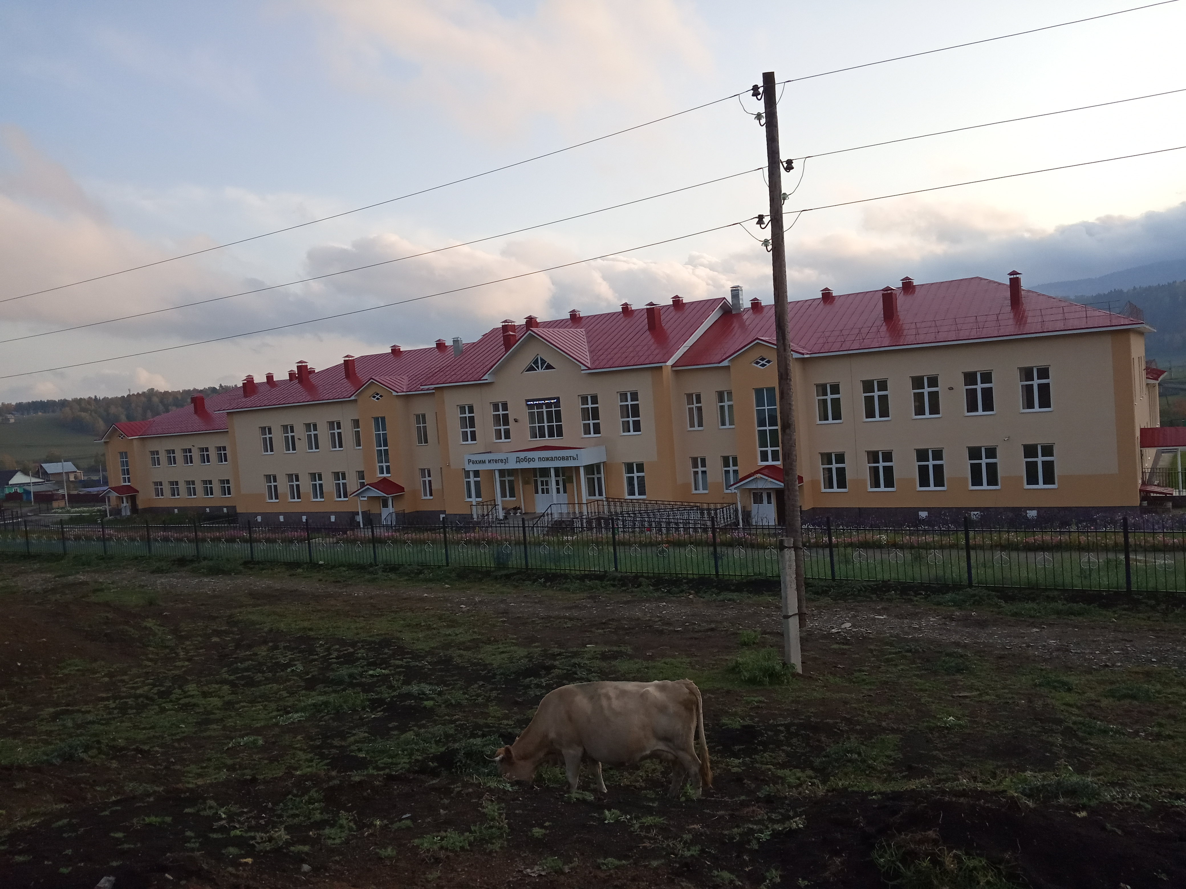 Новая деревенская школа в дер.Новосубхангулово Бурзянского района